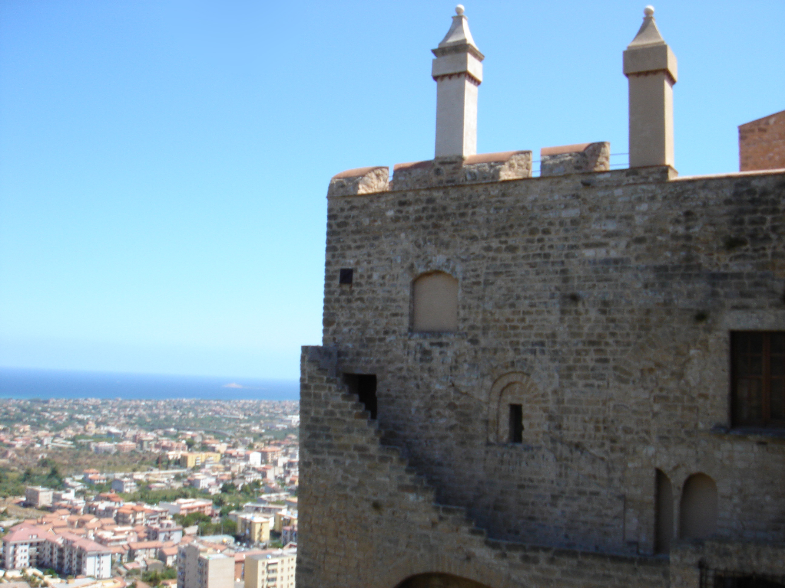 Il Castello di Carini, presso Palermo.